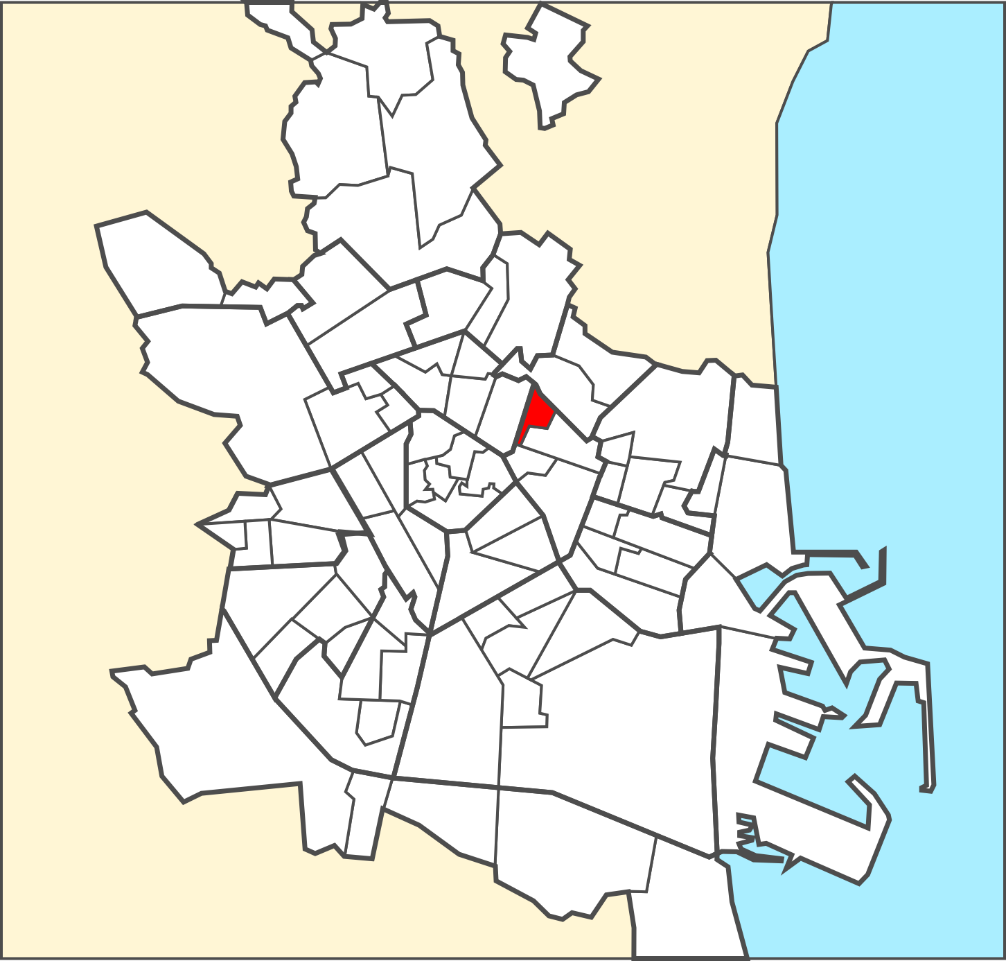 Localització del barri dins de la ciutat de València.